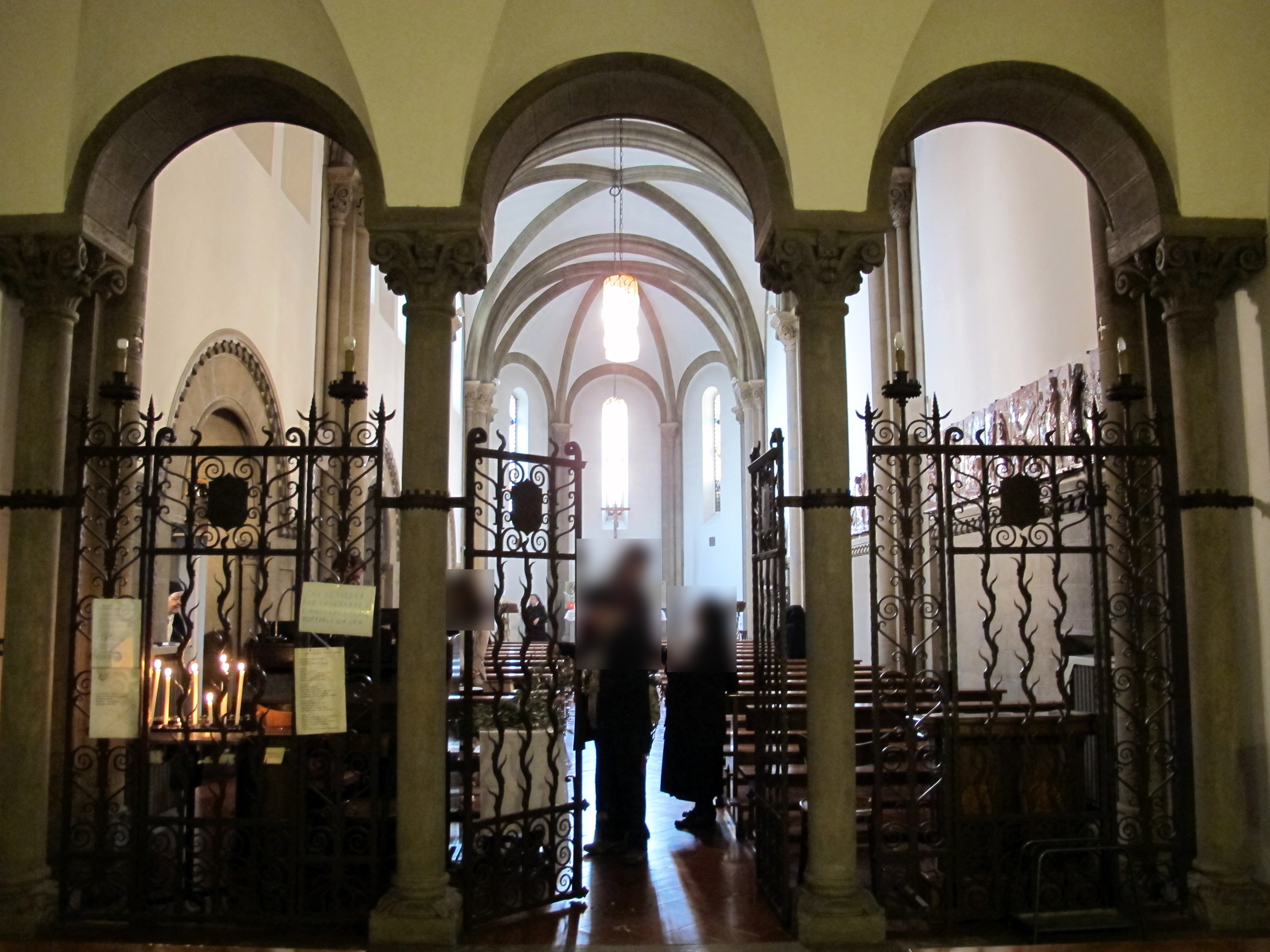 Firenze, miscellanea